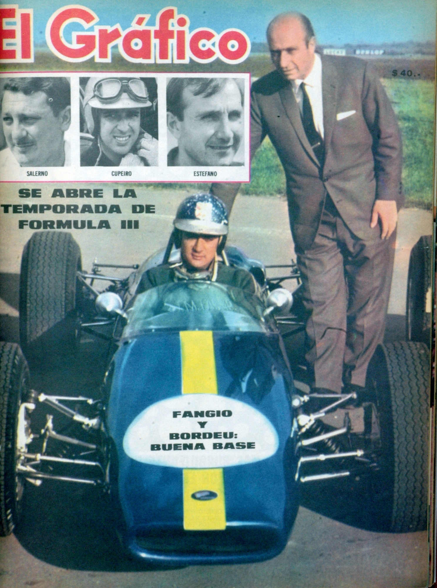 El Grafico del 18 de Enero de 1966. Edicion 2415